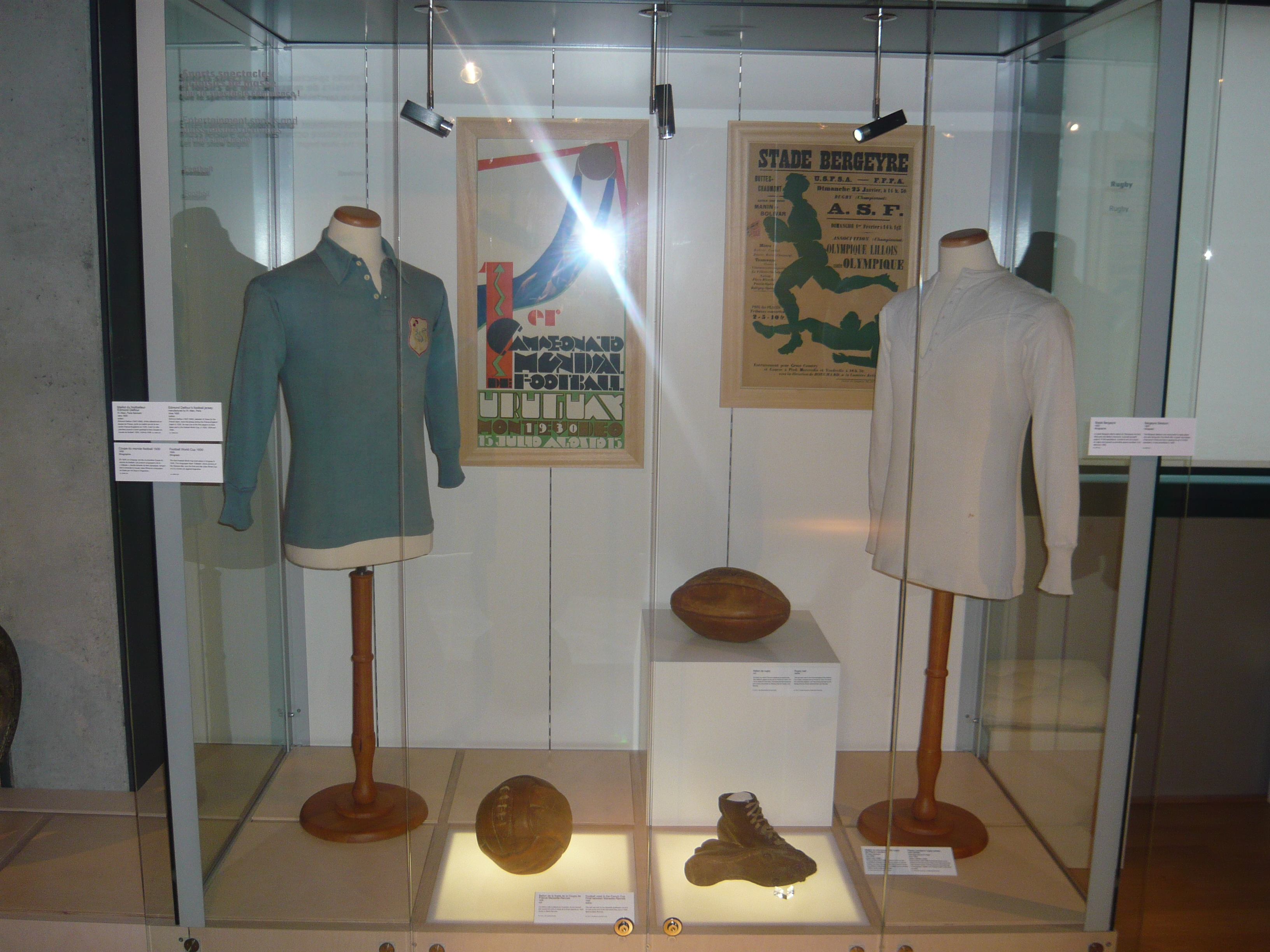 A gauche maillot d'Edmond Delfour porté lors du match France-Angleterre en 1933. Au premier plan en bas, chaussures portés par le footballeur Uruguayen José Andrade lors de la Coupe du monde 1930. En arrière plan, à gauche, affiche de la première Coupe du monde de football en 1930.